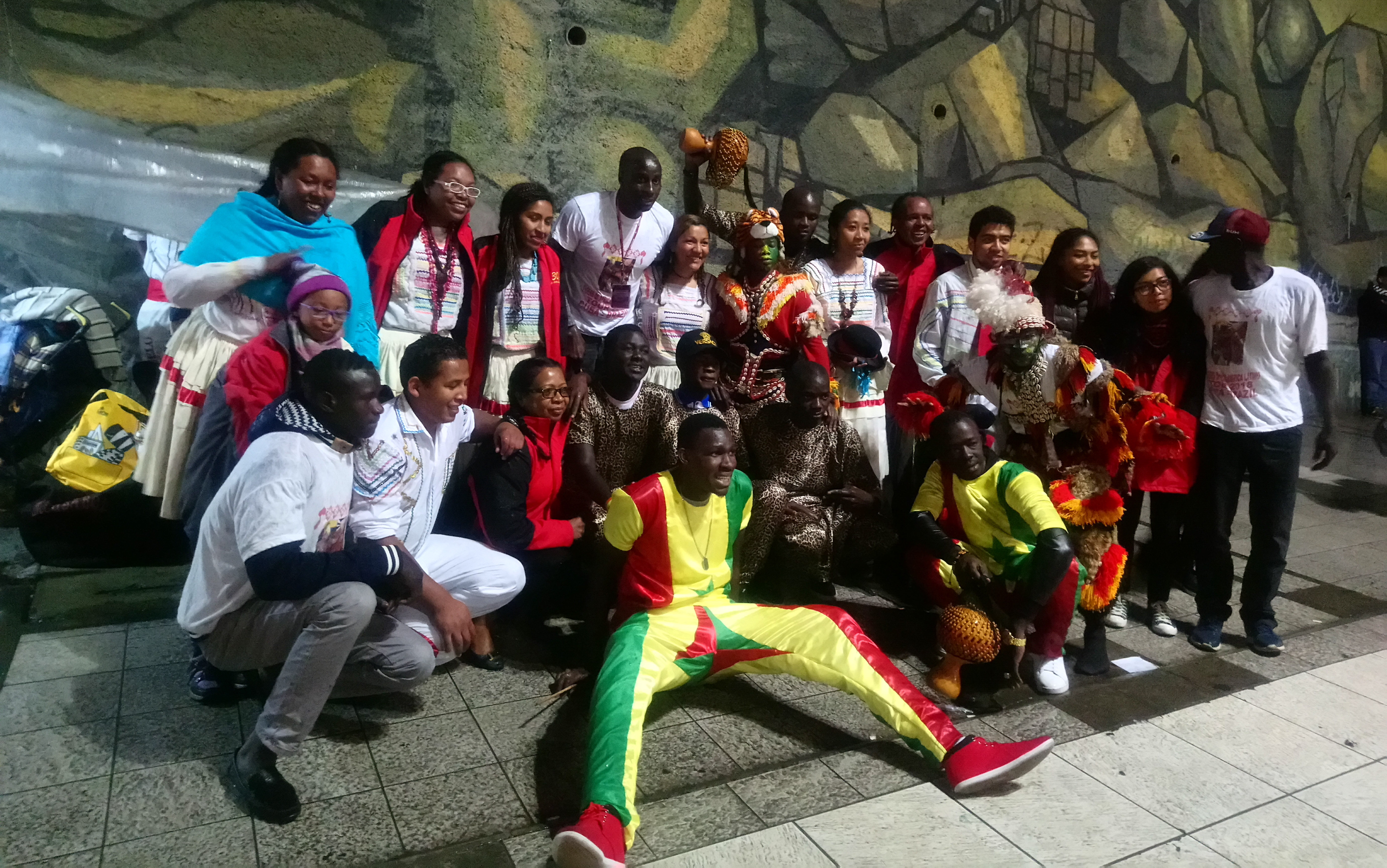 Grupo de saya afroboliviana y grupo The Tigers of África de Senegal